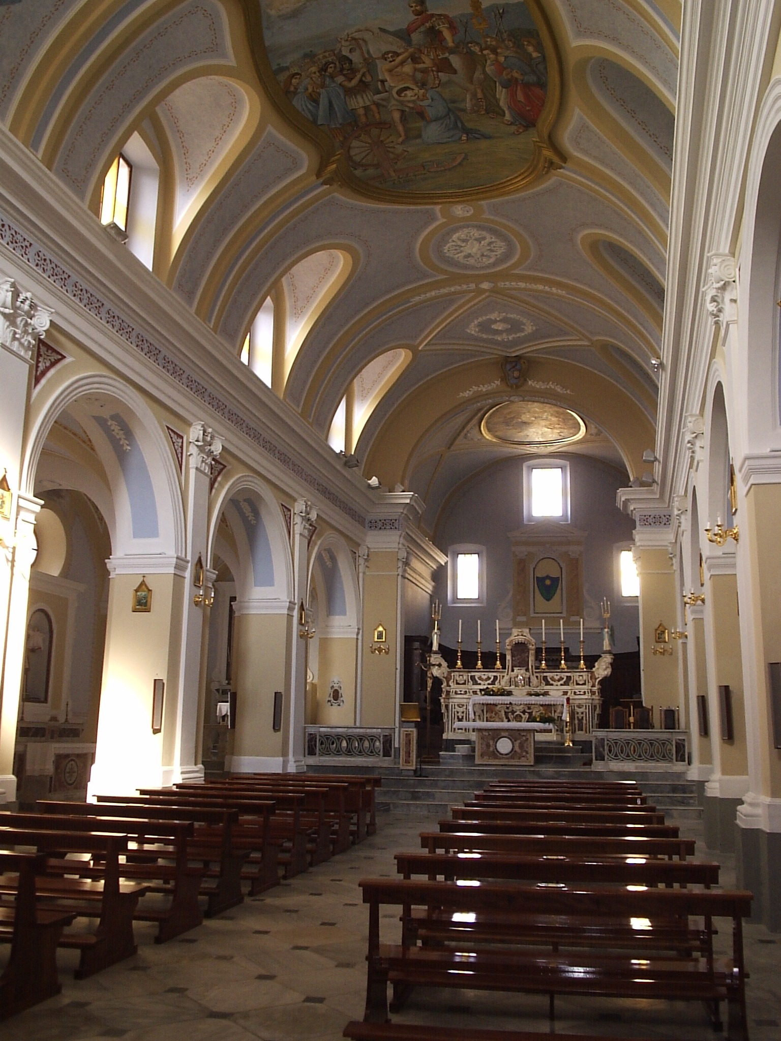 Chiesa_Madre_Santa_Catrina_d'Alessandria